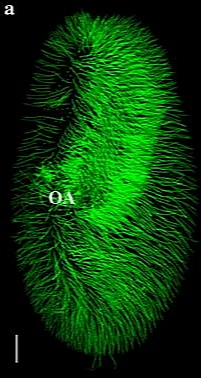 Figura 1. Patrón de cilios y cuerpos basales en Paramecium. Las imágenes son proyecciones de imágenes confocales tomadas a nivel del lado ventral de la célula. A) Patrón ciliar. La célula se marca con un anticuerpo dirigido contra la tubulina monoglicilada. El cuarto anterior o la mitad anterior parece más brillante porque está más densamente ciliado que otras partes de la célula. La paliza de estos cilios guía la corriente de agua hacia el centro celular donde se encuentra el aparato oral (OA). En el polo posterior de la célula hay pocos cilios no móviles más largos. Barras de 20 μm.